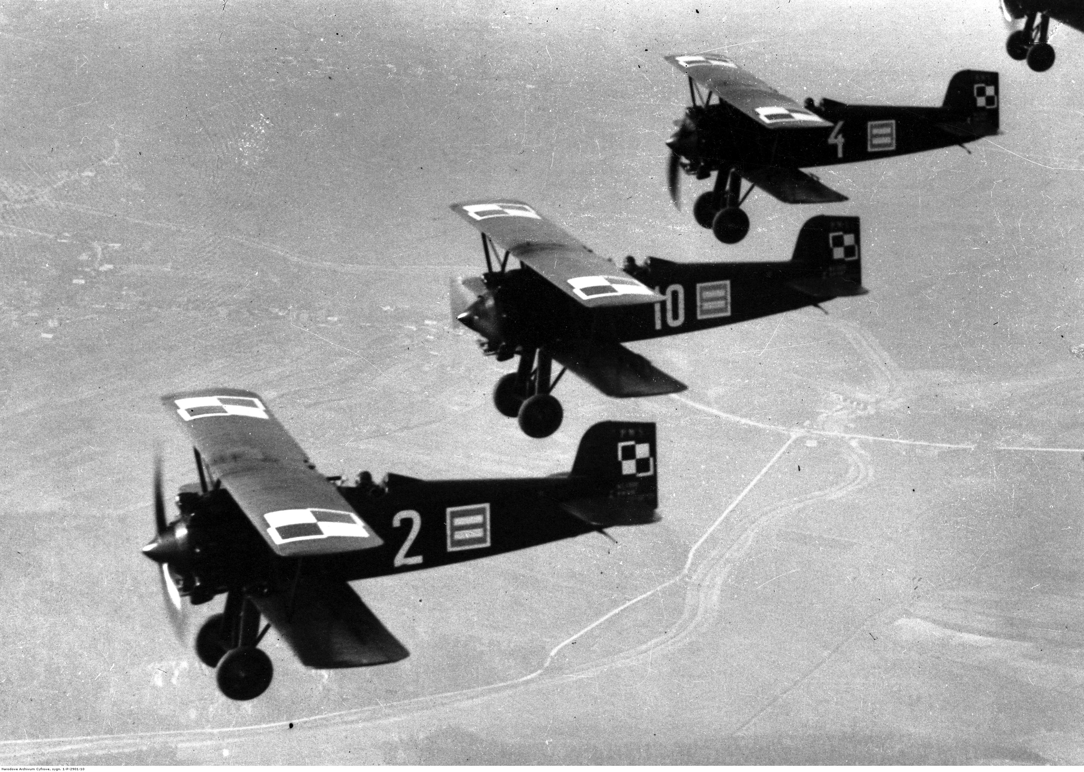 Samoloty PWS-A podczas defilady z okazji Święta 3 Maja w Krakowie w 1932 roku. Koncern Ilustrowany Kurier Codzienny - Archiwum Ilustracji. Sygnatura: 1-P-2901-10